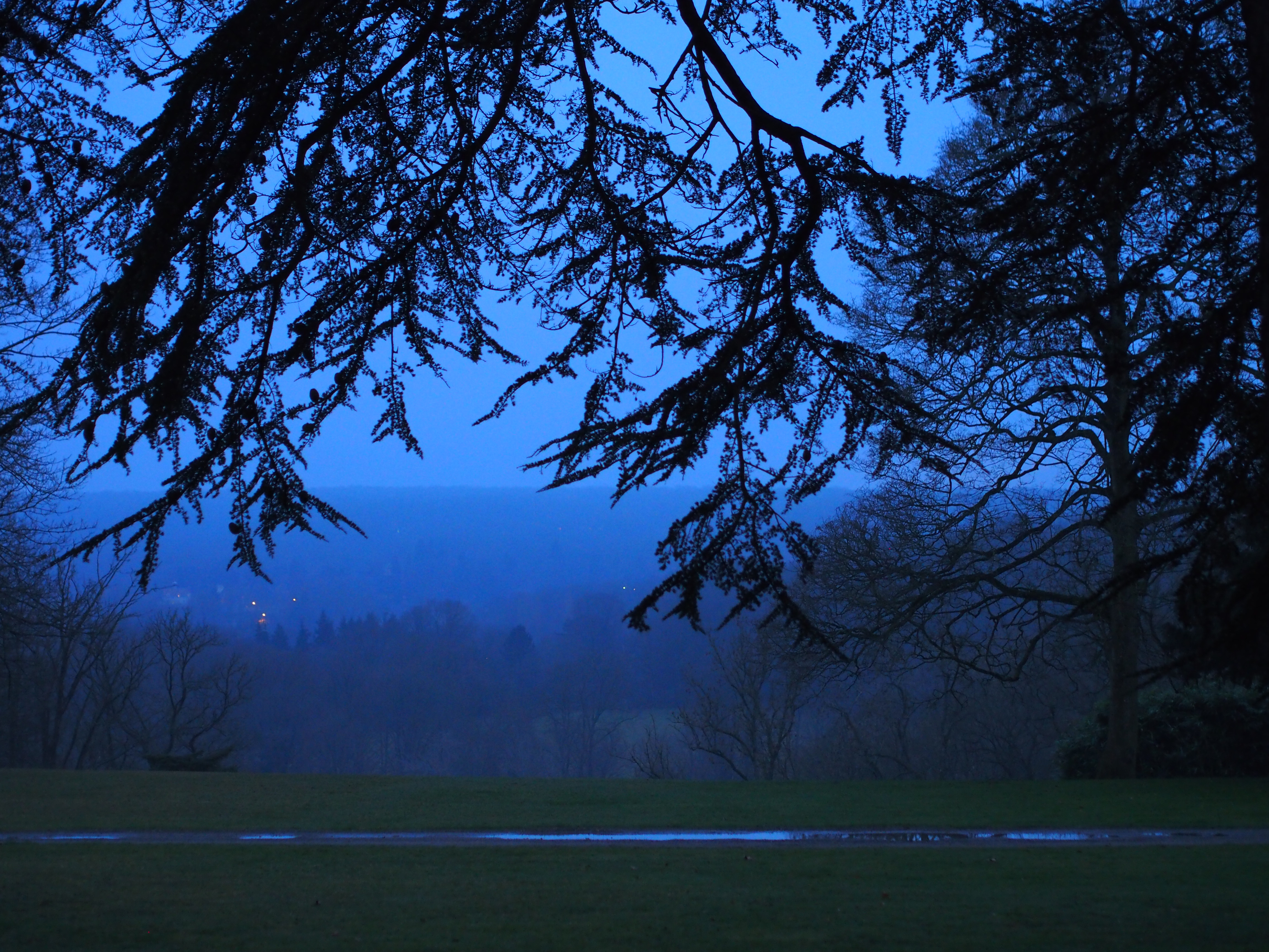 Vue vers le vallon, depuis le seuil du musée de Port-Royal des Champs (France), entre chien et loup.